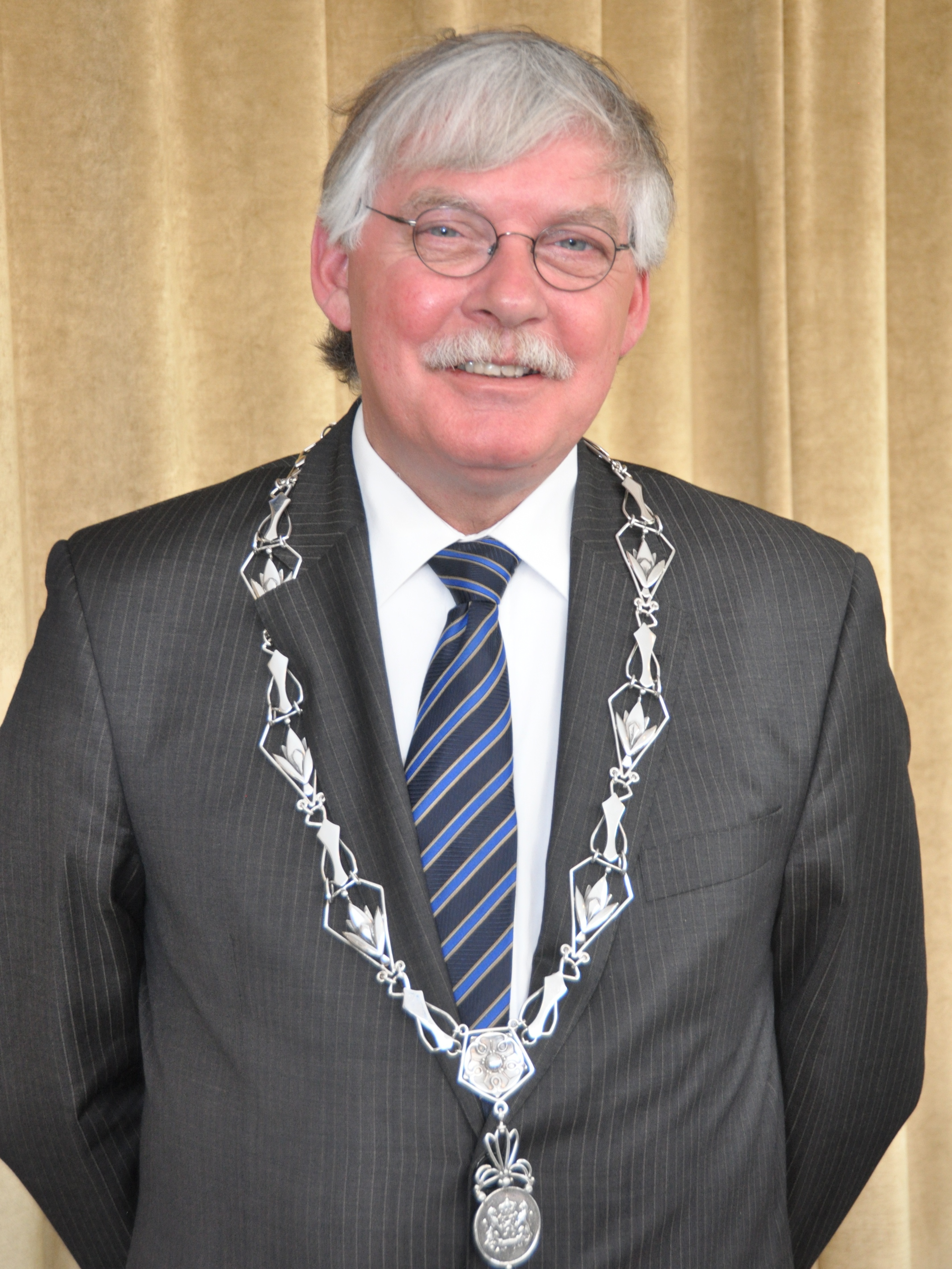 Cees van der Knaap bij de uitreiking van de Koninklijke onderscheidingen, de lintjesregen van 2010, in de Reehorst